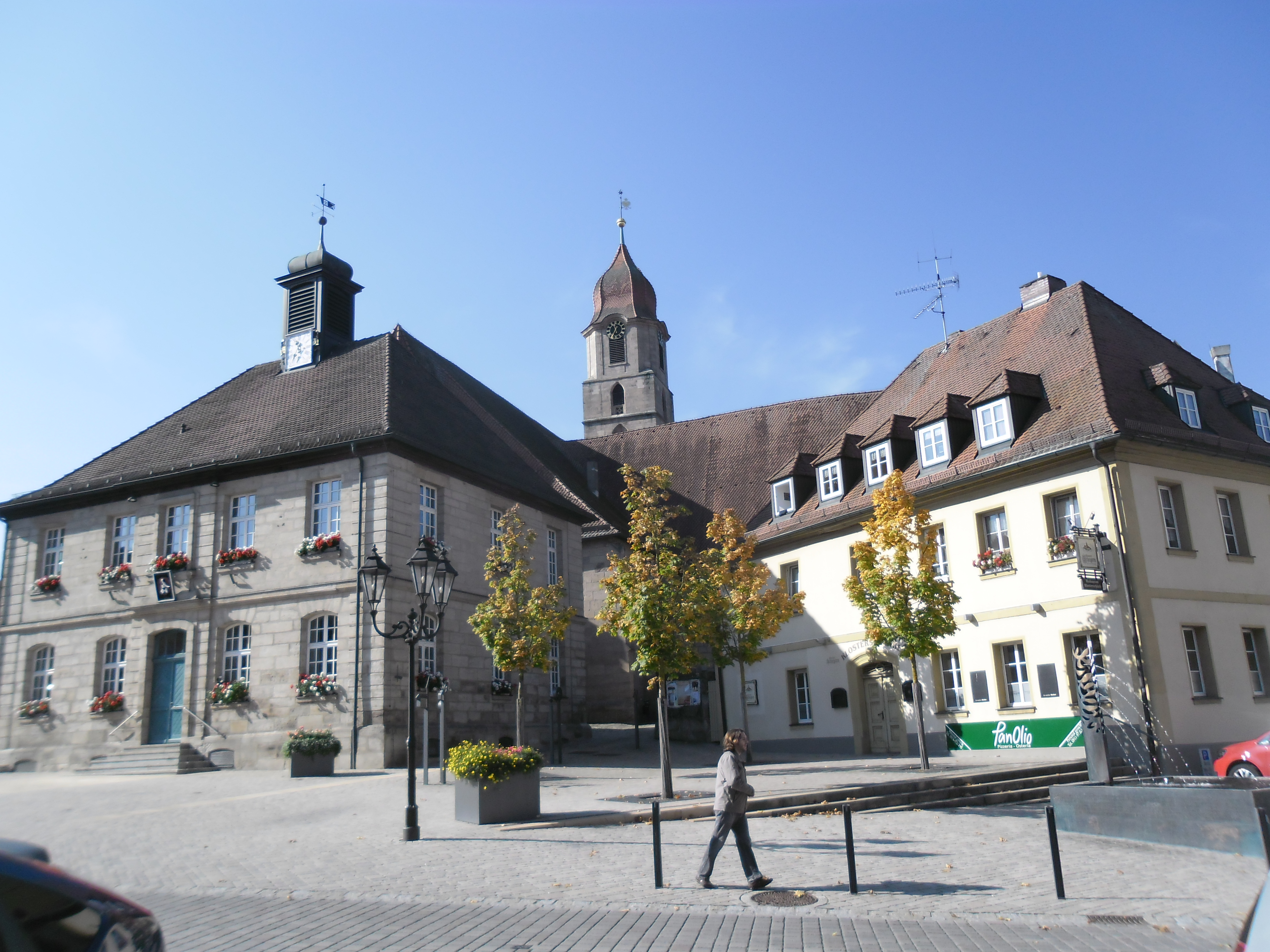 siehe Bildtitel